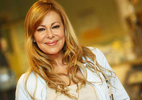 La actriz española Ana Obregón, en una imagen de 2008.